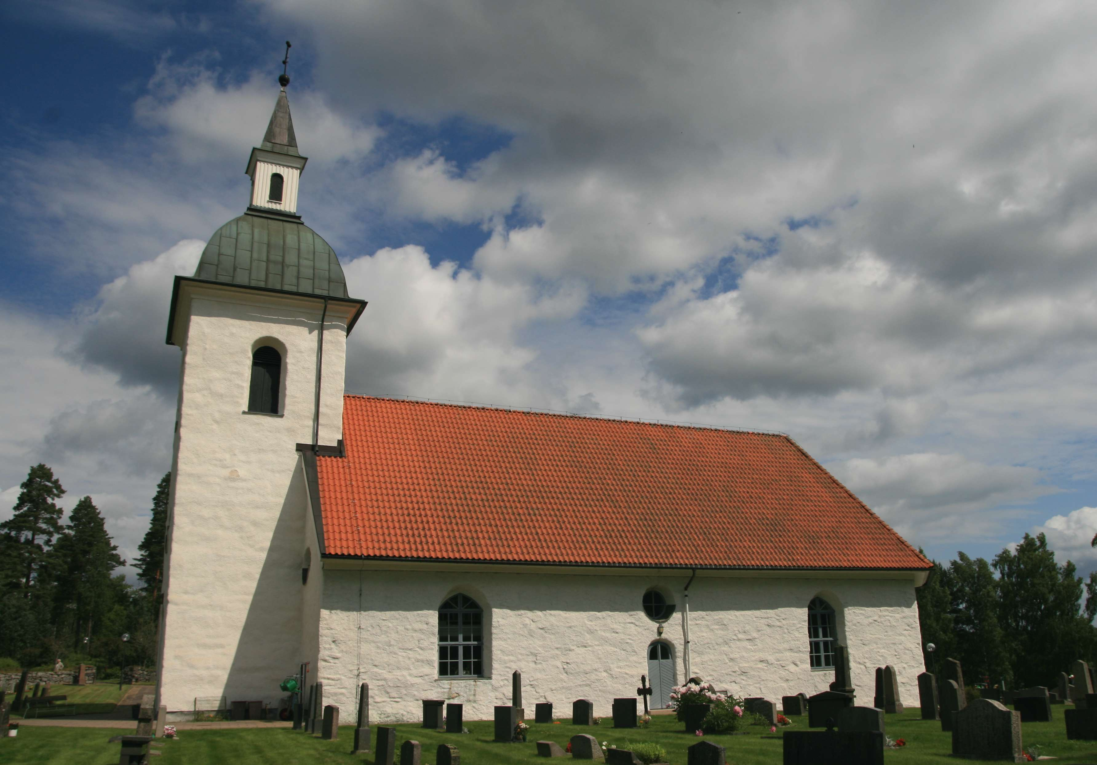 Nössemarks kyrka är en kyrkobyggnad i Nössemark i Dals-Eds kommun i nordvästra Dalsland. Den är församlingskyrka i Nössemarks församling i Karlstads stift.